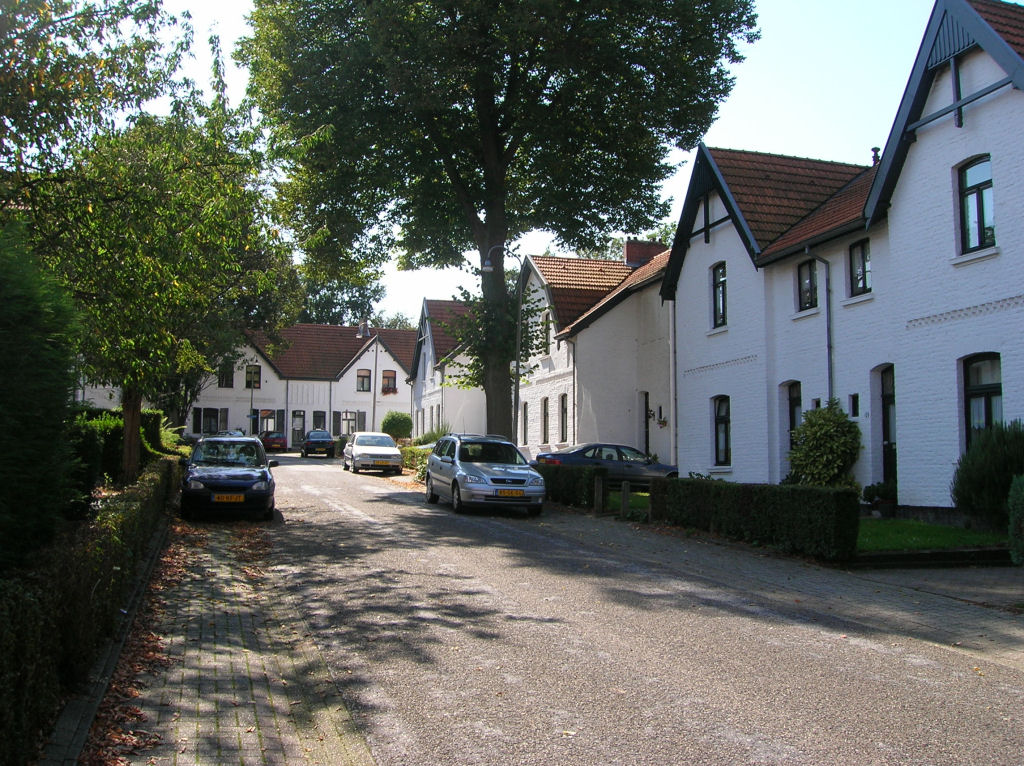 Kolonie de Hopel (gemeente Kerkrade)